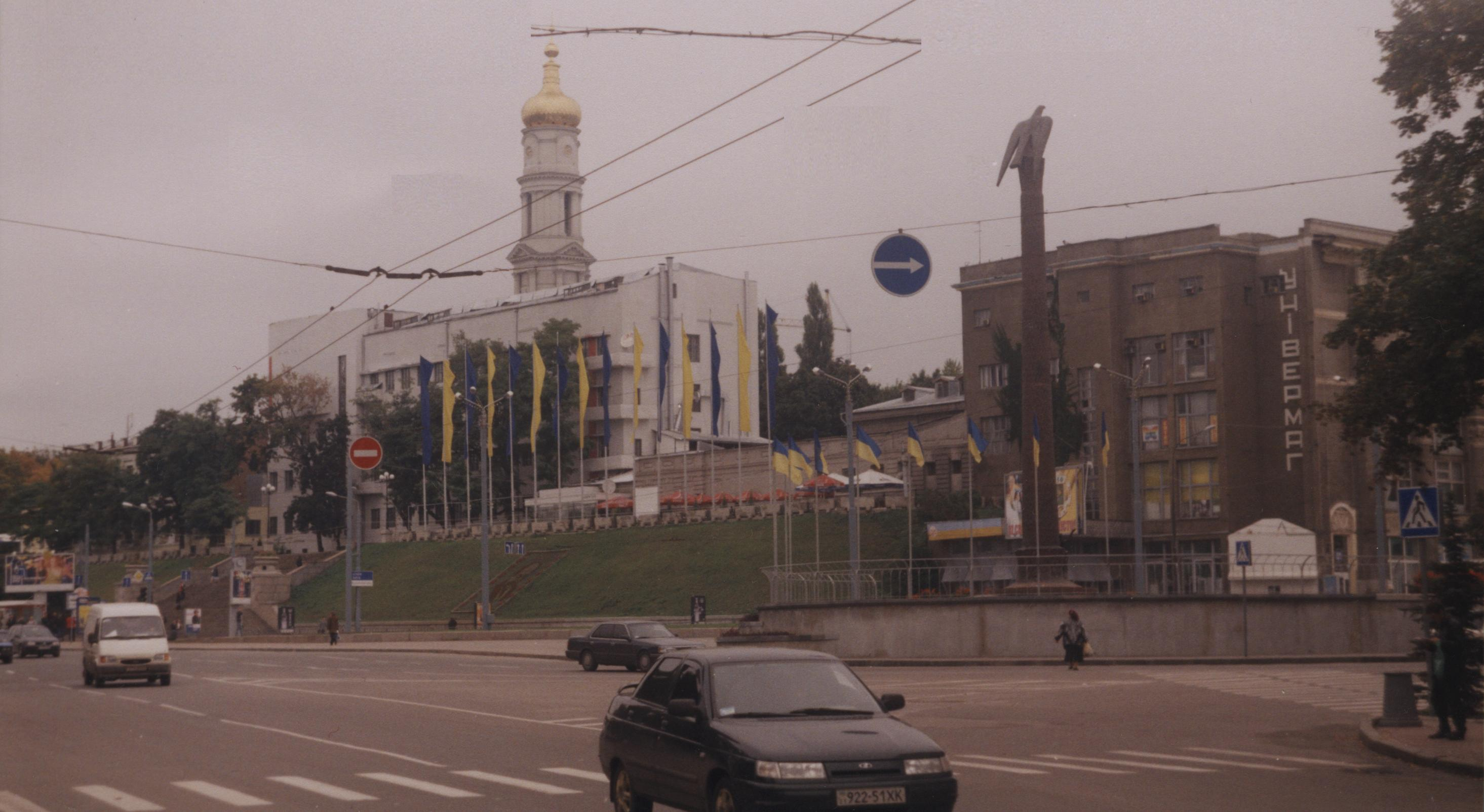 Харьков, пл. Розы Люксембург и Университетская горка